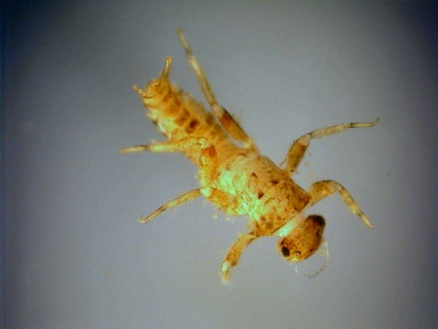 Teloganopsis deficiens nymph